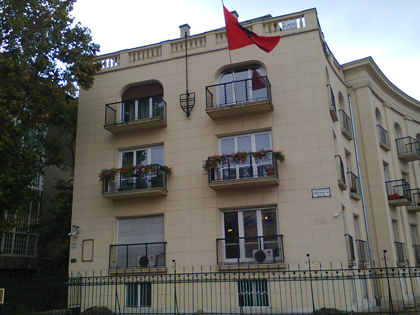 Ambasada Albanii w Budapeszcie